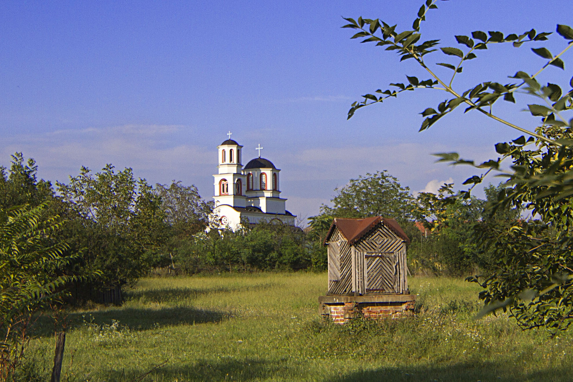 Поглед на цркву у Дражњу